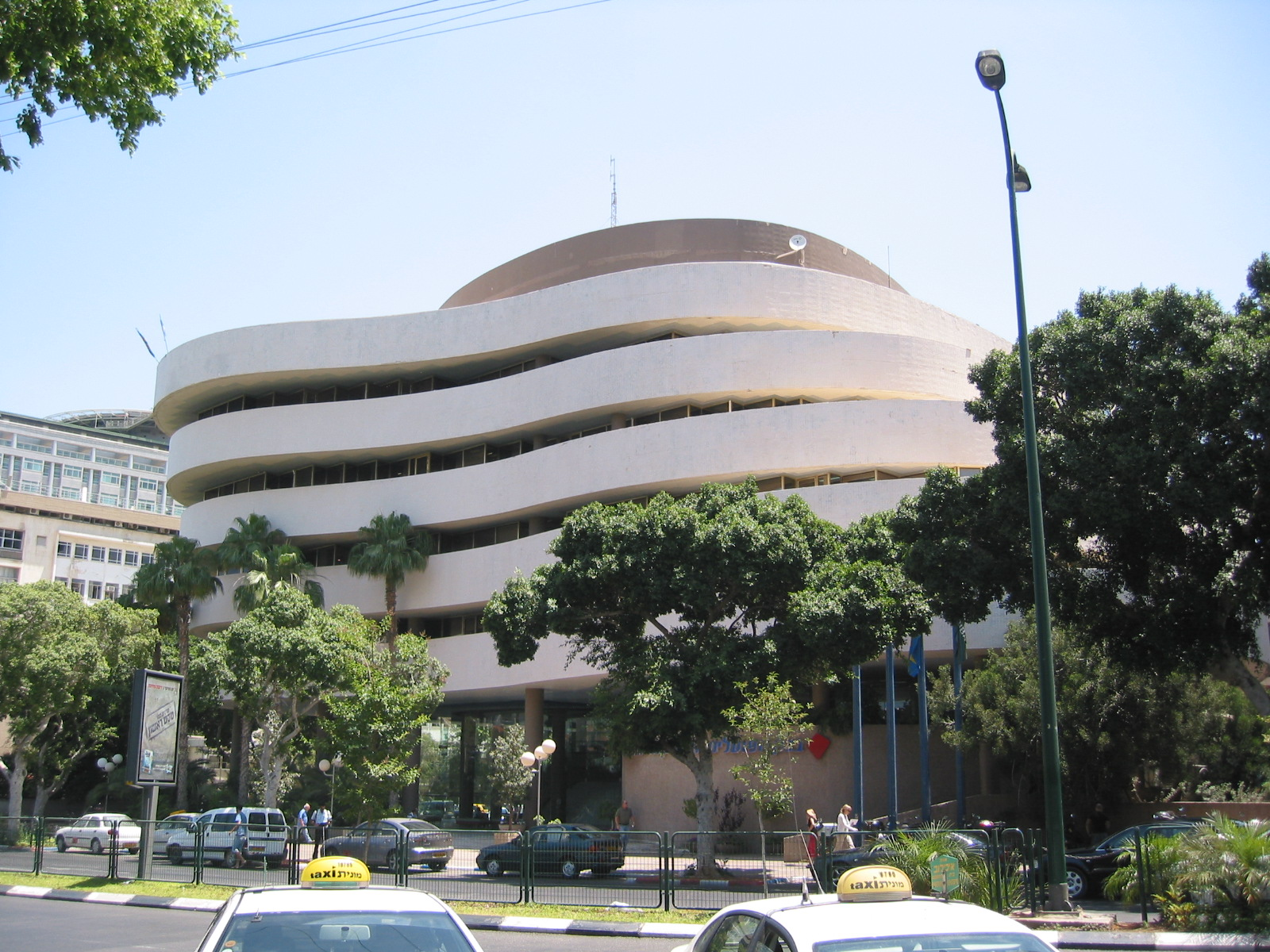 Asia House, Tel Aviv